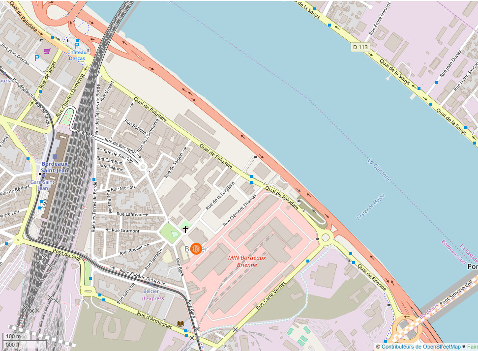 Quartier Bordeaux-Belcier sur fond de carte OSM. This map may be incomplete, and may contain errors. Don't rely solely on it for navigation.